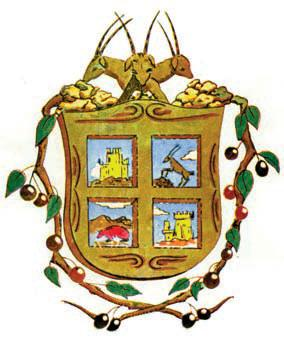 Escudo de Minglanilla (Cuenca)